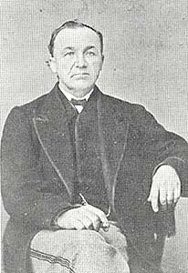 Folkkirurgen Johan Jakob Bäck (1824–1879). Foto från 1860-talet. This work is in the public domain in its country of origin and other countries and areas where the copyright term is the author's life plus 70 years or less. You must also include a United States public domain tag to indicate why this work is in the public domain in the United States. Note that a few countries have copyright terms longer than 70 years: Mexico has 100 years, Jamaica has 95 years, Colombia has 80 years, and Guatemala and Samoa have 75 years. This image may not be in the public domain in these countries, which moreover do not implement the rule of the shorter term. Côte d'Ivoire has a general copyright term of 99 years and Honduras has 75 years, but they do implement the rule of the shorter term. Copyright may extend on works created by French who died for France in World War II (more information), Russians who served in the Eastern Front of World War II (known as the Great Patriotic War in Russia) and posthumously rehabilitated victims of Soviet repressions (more information). This file has been identified as being free of known restrictions under copyright law, including all related and neighboring rights.